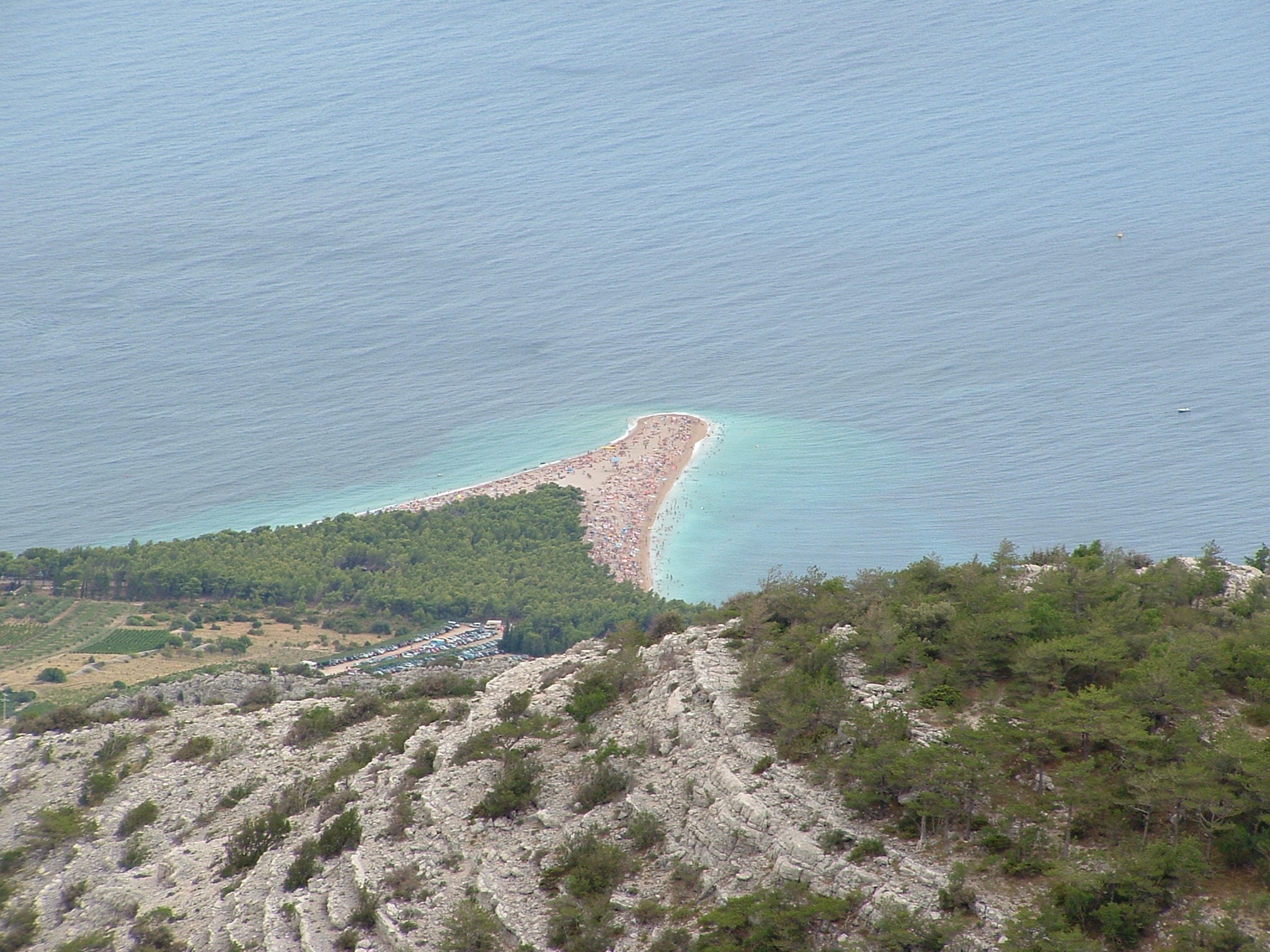 la spiaggia di Bol vista da Vidova Gòra (monte San Vito)